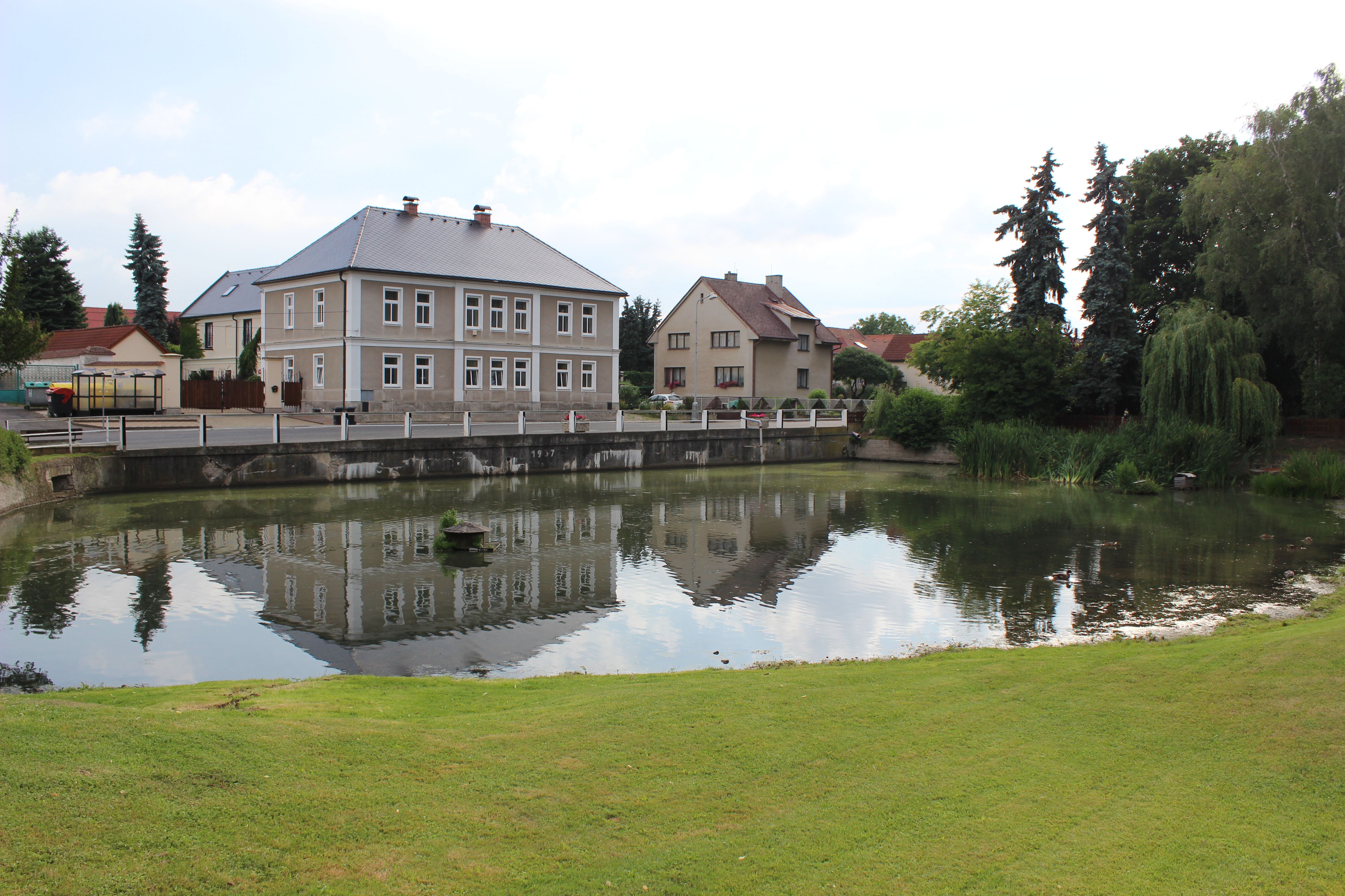 Rybník na návsi v Nemyslovicích. V pozadí dům číslo popisné 19.